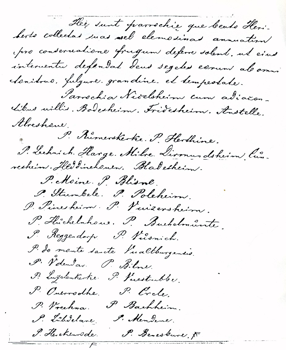 Abschnitt aus dem Codex Thiodorici (um 1155)